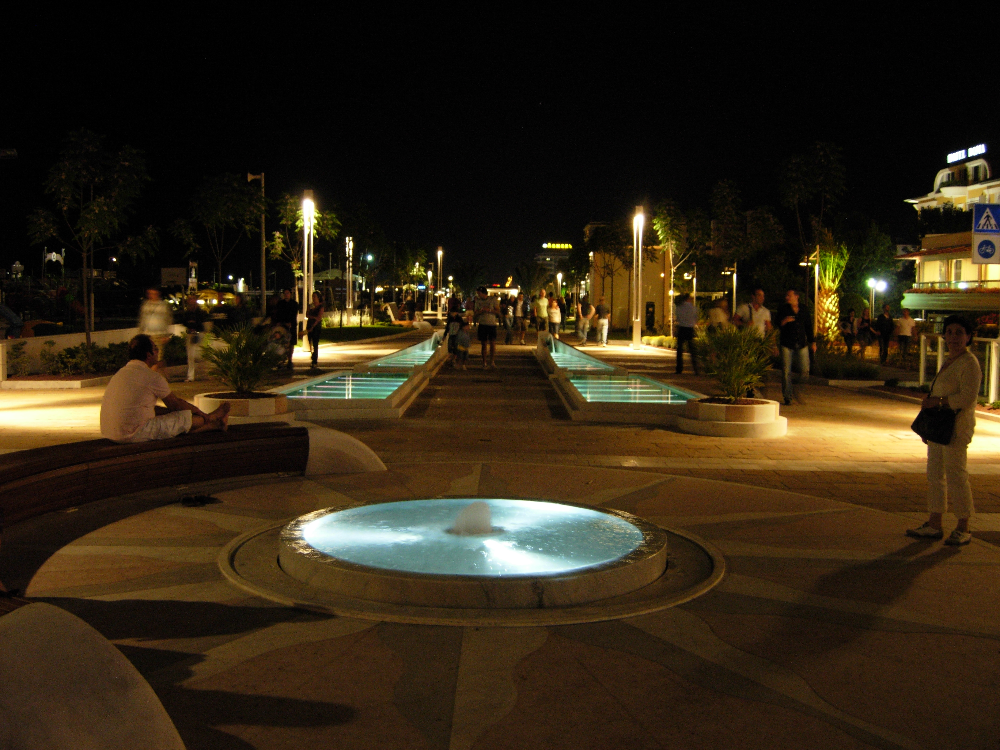 Lungomare di Riccione